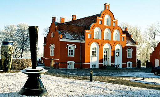 Danmarks Keramikmuseum - Grimmerhus, Middelfart, ved vintertid. I forgrunden Bjørn Poulsens over 3,5 meter høje Tordenkilen, 1996.